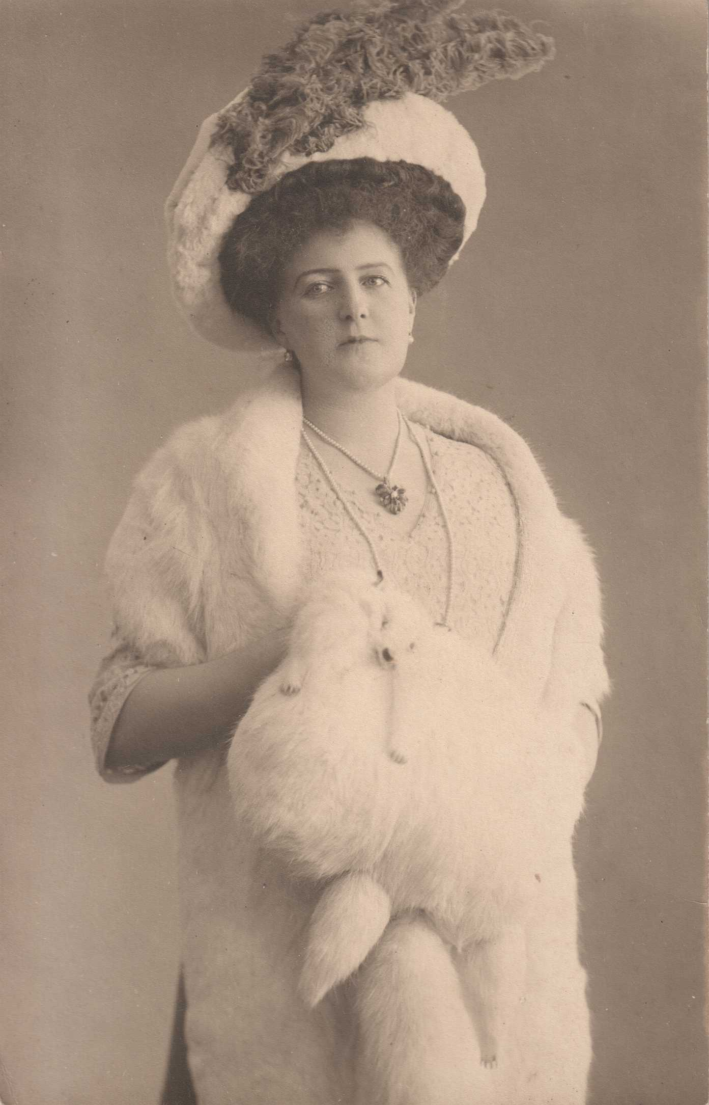 Dame mit Polarfuchsstola und Muff aus Polarfuchs (ausgefallene Arbeit, mit ausgearbeitetem Kopf und Läufen, als würde ein Fuchs aus dem Muff herausgucken), weiße Pelzkappe mit üppiger Federgarnierung. Rückseitig gestempelt "Atelier Kaufhaus des Westens GmbH Berlin". Handschriftlich "Liseth Dez. 1912"